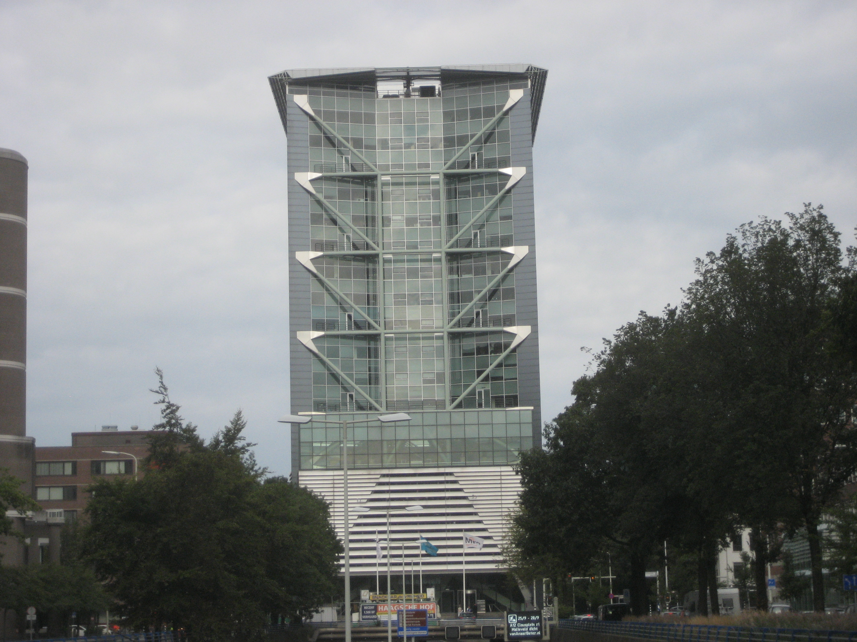 De Malietoren, Bezuidenhoutseweg 12, Den Haag. Gebouwd door Architectenbureau Benthem Crouwel, boven de snelweg Utrechtsebaan (A12). 72 meter hoog, 19 verdiepingen. Zetel van onder meer VNO-NCW, AWVN, PUM.